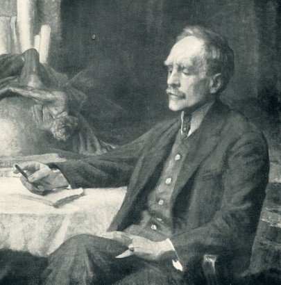 August Brömse (1873-1925), Německý malíř